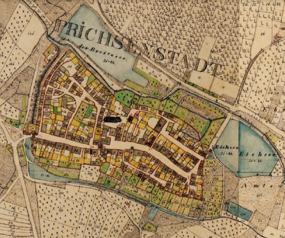 Kartenausschnitt Urkataster Bayern, Altstadt Prichsenstadt, um 1830